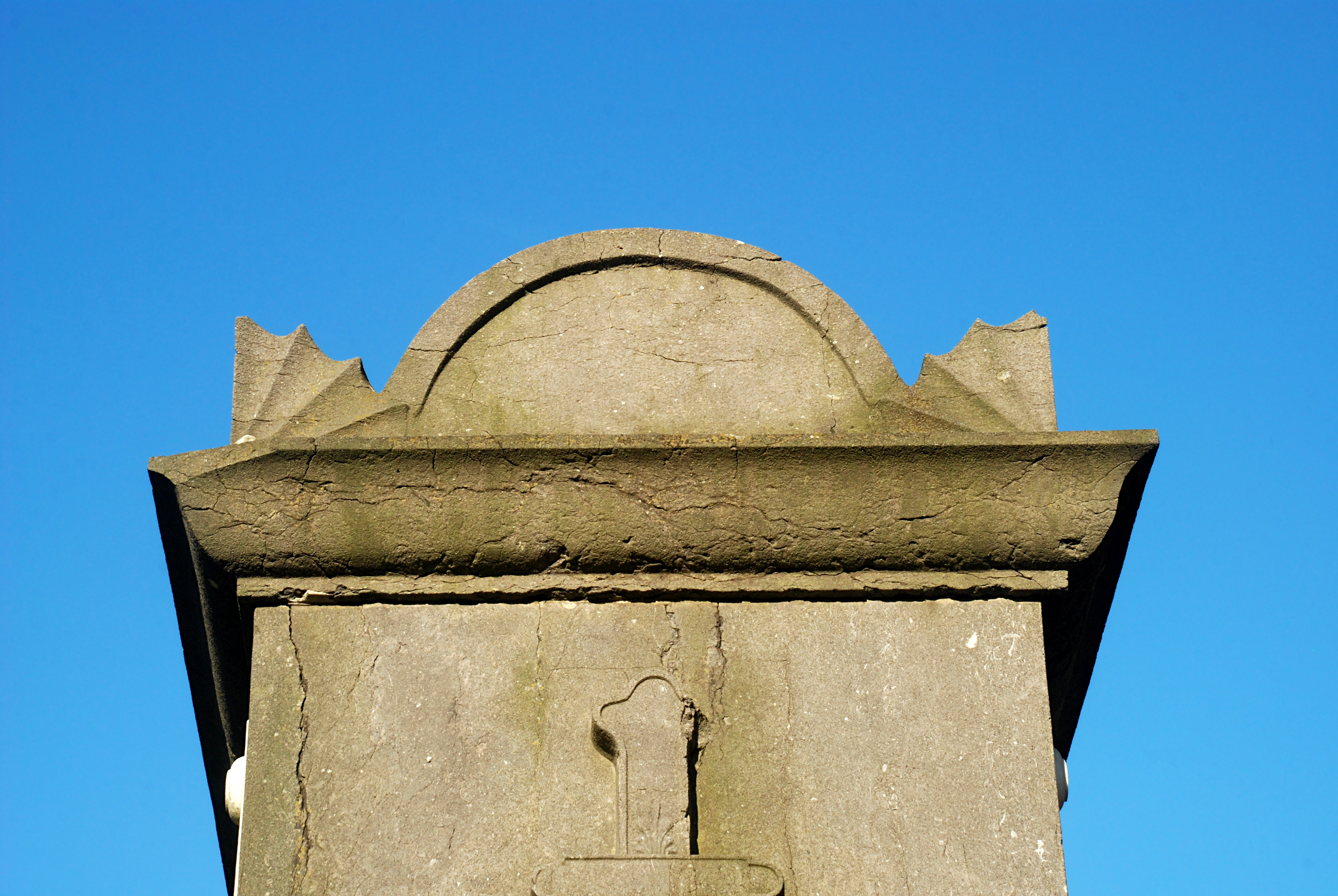 Belgique - Brabant wallon - Genappe - Ways - Mausolée Duhesme (tombe du Général Duhesme, mort des suites des blessures encourues à la bataille de Waterloo)